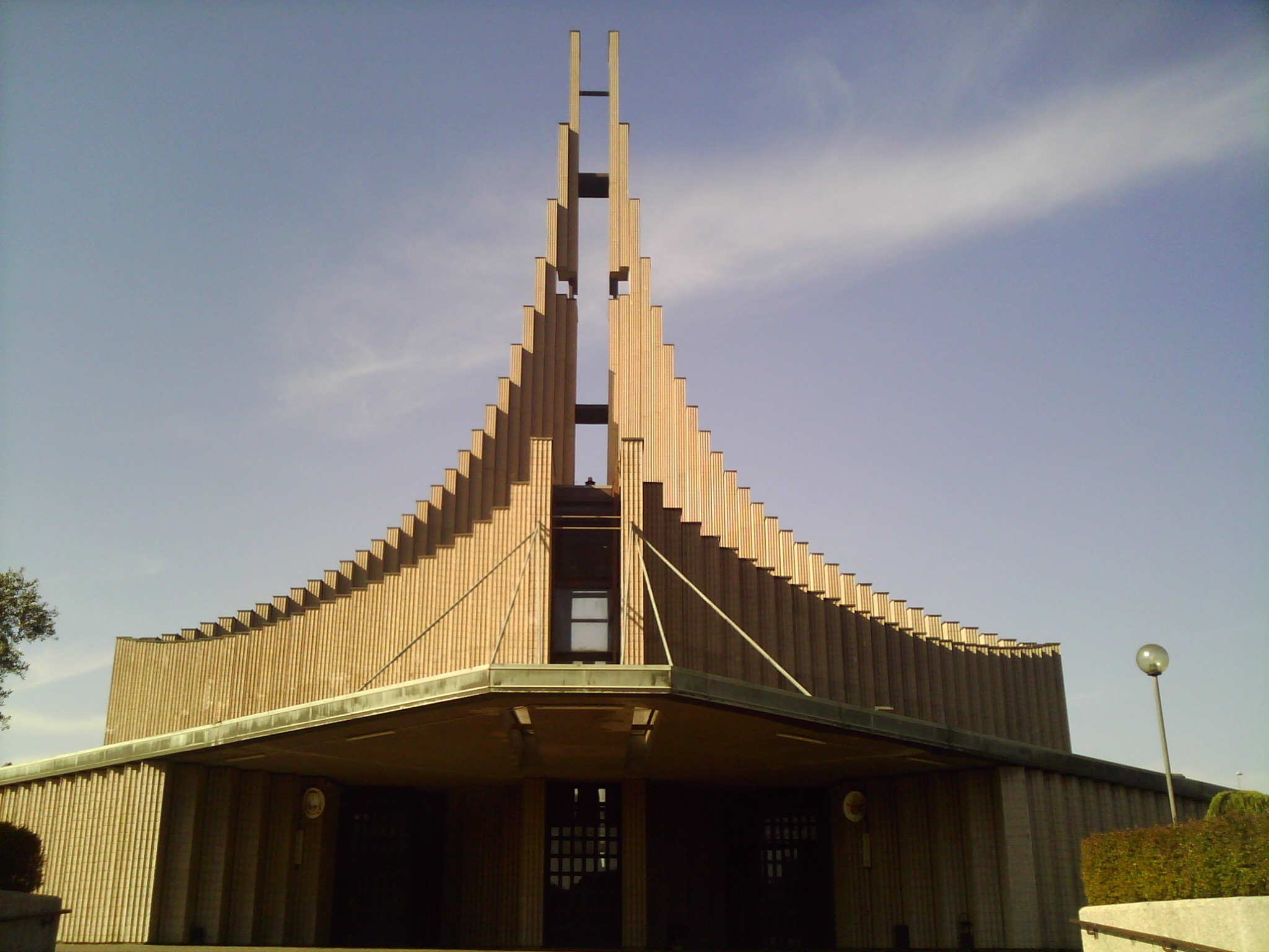 la chiesa dell'architetto Spadolini a Tor Bella Monaca, Roma